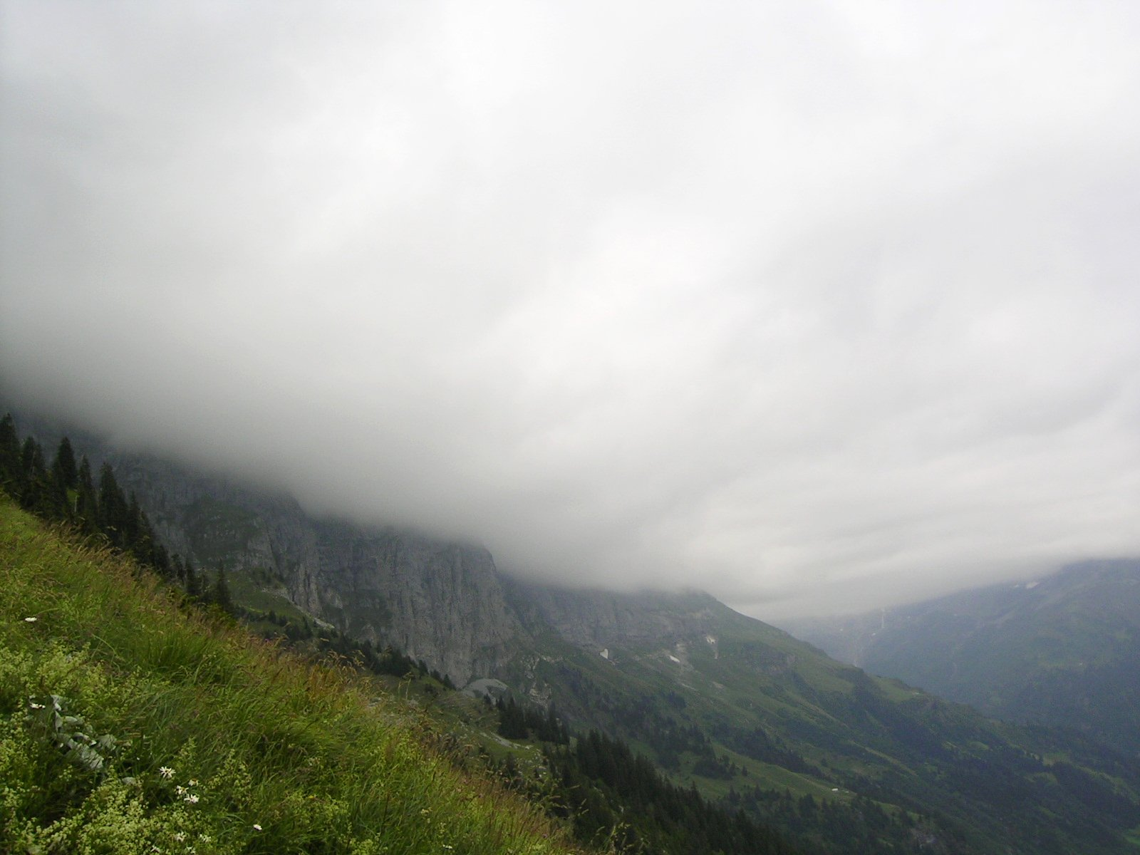 (de) Untergrenze von Stratocumulus-Wolken. Aufnahmeort: Sätteli, Gadmen, CH Bearbeitung: Farbwerte und -kurven, aber nur wenig (GIMP